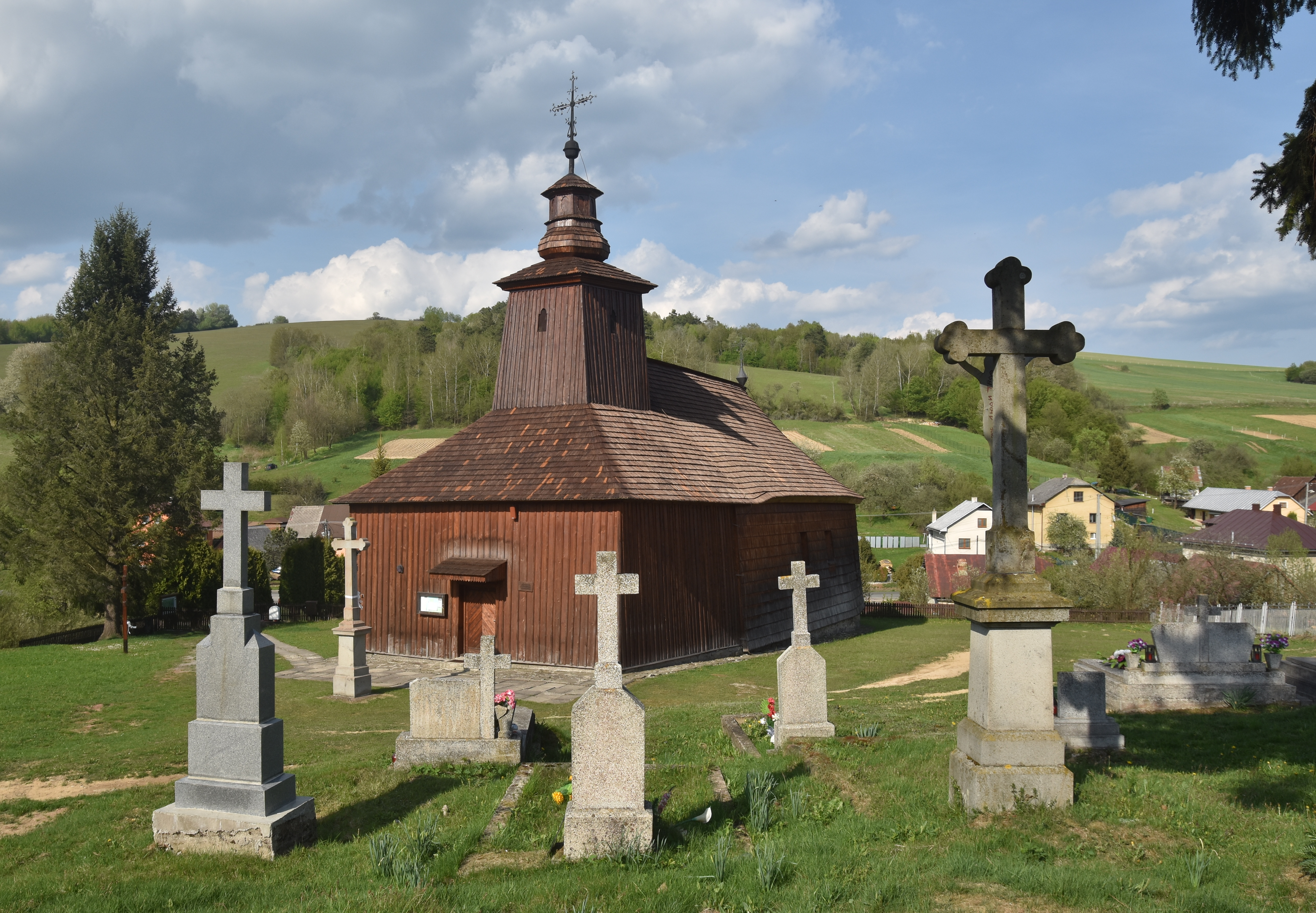 Gréckokatolícky chrám sv. evanjelistu Lukáša v obci Krivé, okres Bardejov.